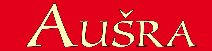 Логотип „Аушри” – двотижневика литовської національної меншини у Польщі.